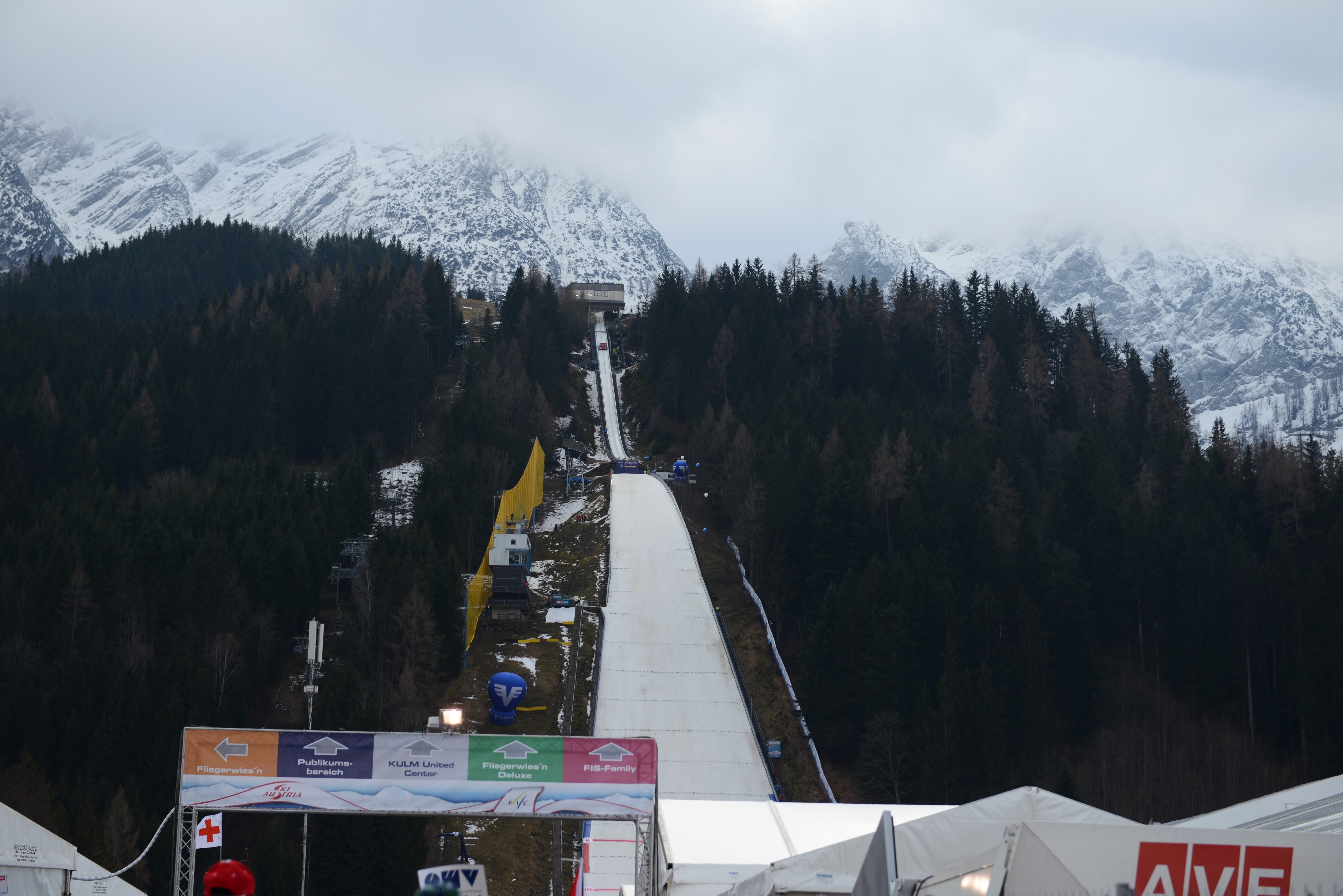 Tauplitz, Steiermark, am Kulmkogel, Skiflugschanze Kulm am 12. Jänner 2014